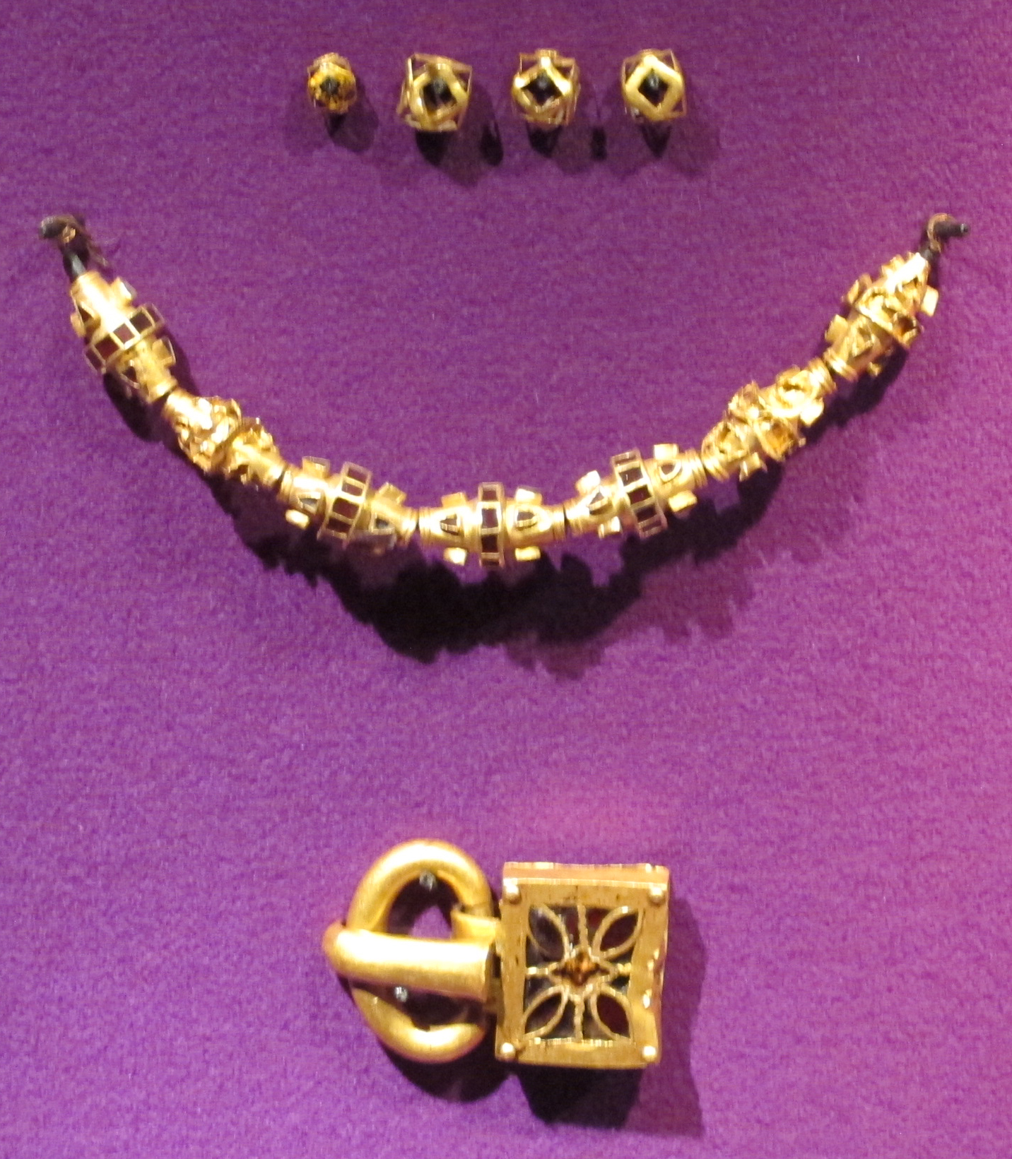 Tesoro di principe gepidico da someseni, 450-500 ca.